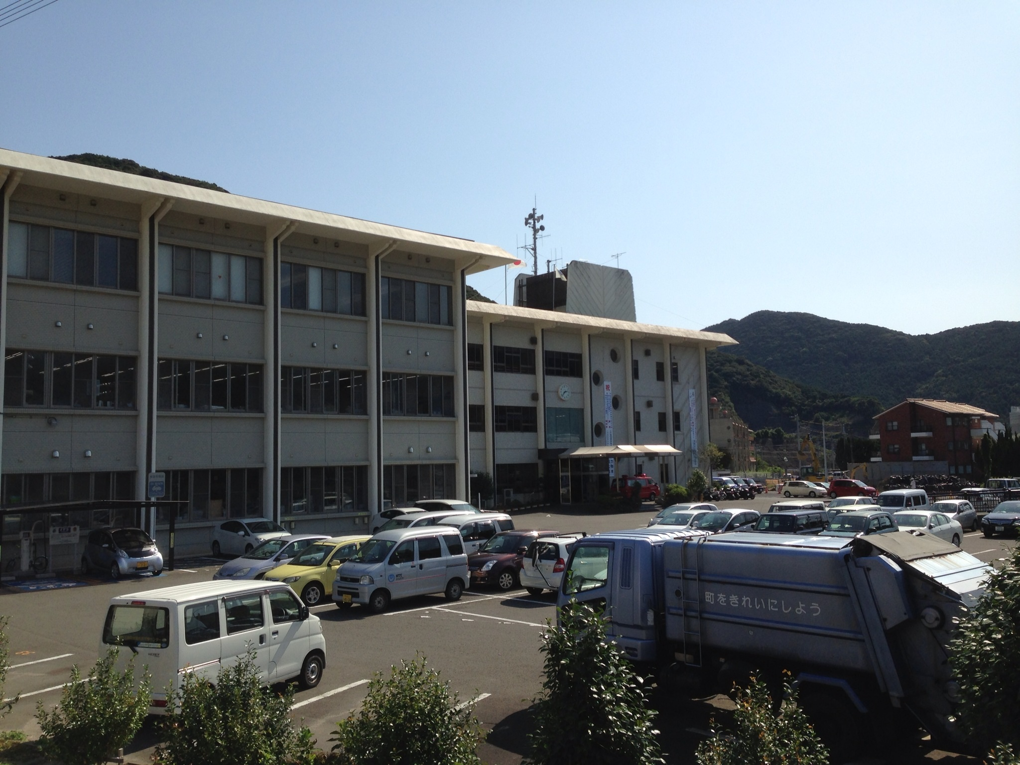 長崎県新上五島町役場全景